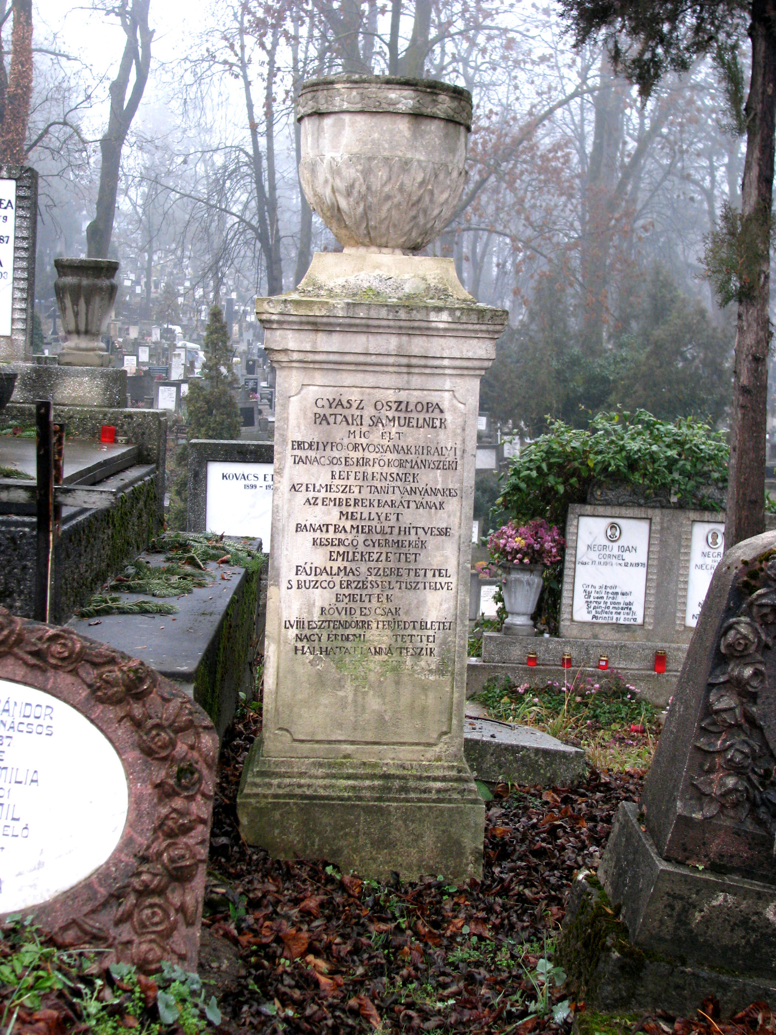 Pataky Sámuel síremléke a kolozsvári Házsongárdi temetőben 082